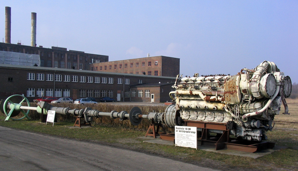 Schiffsdieselmotor 40 DM mit Verstellpropelleranlage Zweitaktdiesel mit 2-stufiger Aufladung 12 Zylinder V-Motor Leistung bei Nenndrehzahl von 750 U/min: 2200 PS (1618 kW) Verwendung: MSR-Schiffen Projekt "Condor" U-Jagd-Schiffe Projekt "Hai" ausgestellt im Historisch-technischen Informationszentrum Peenemünde